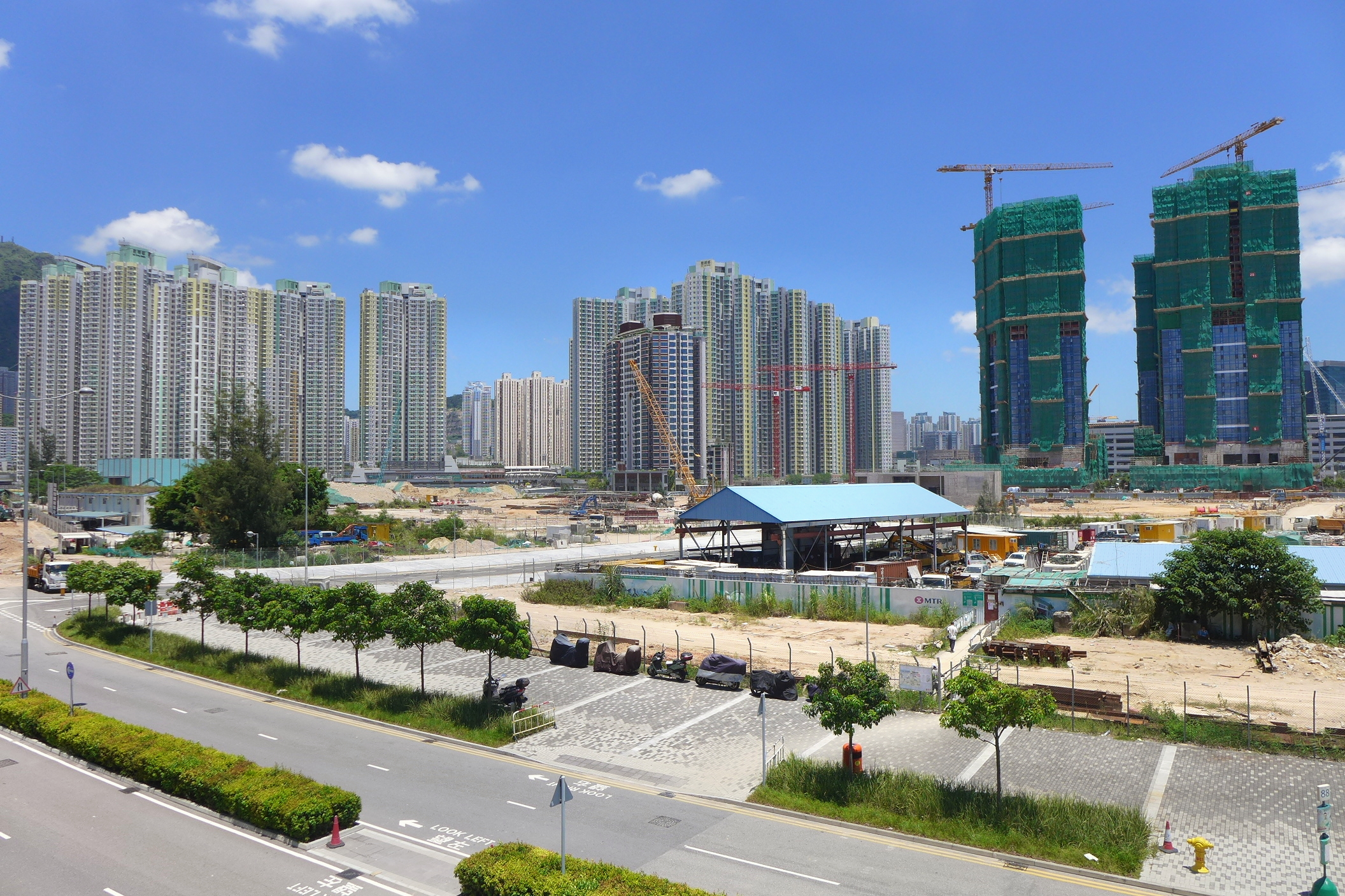 Kai Tak Airport Site View